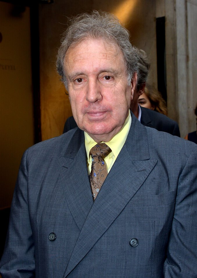 Philippe Magnan à la cérémonie des Molières